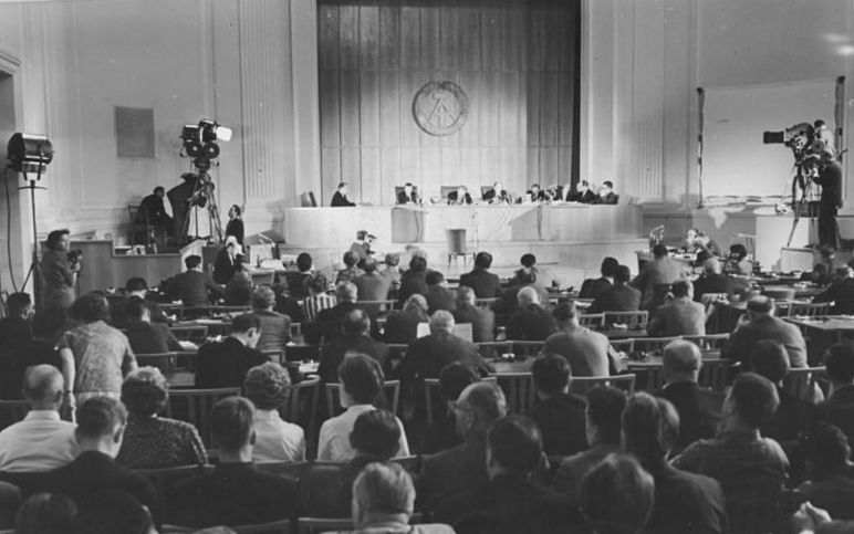 Oberstes Gericht, Globke-Prozess, Gerichtssaal Zentralbild Stöhr-9.7.1963 2. Tag im Globke-Prozeß. Der 1. Strafsenat des Obersten Gerichts der DDR setzte am Vormittag des 9. Juli 1963 die Verhandlungen gegen den des millionenfachen Mordes Angeklagten Staatssekretär des Bonner Bundeskanzleramtes, Dr. Globke fort. UBz: Während des 2. Prozesstages. Übersicht.